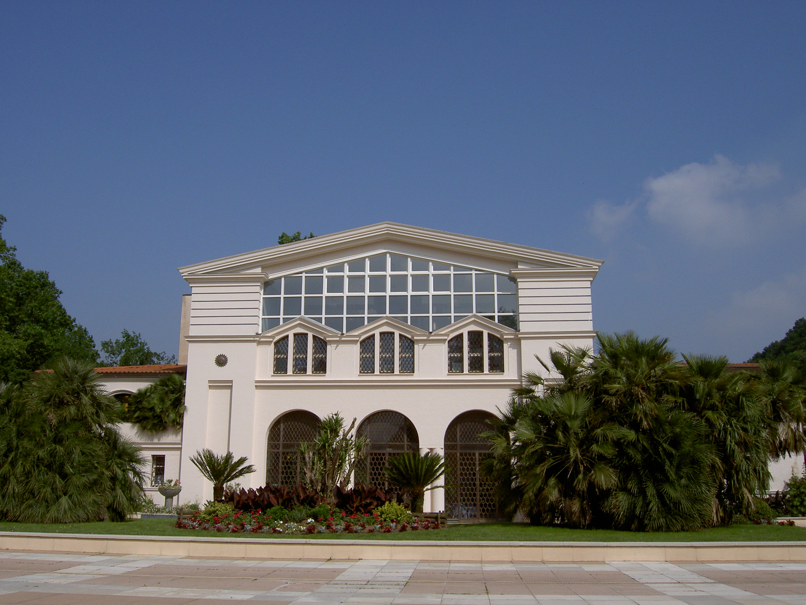 Bâtiment thermal du village de Cambo-les-bains